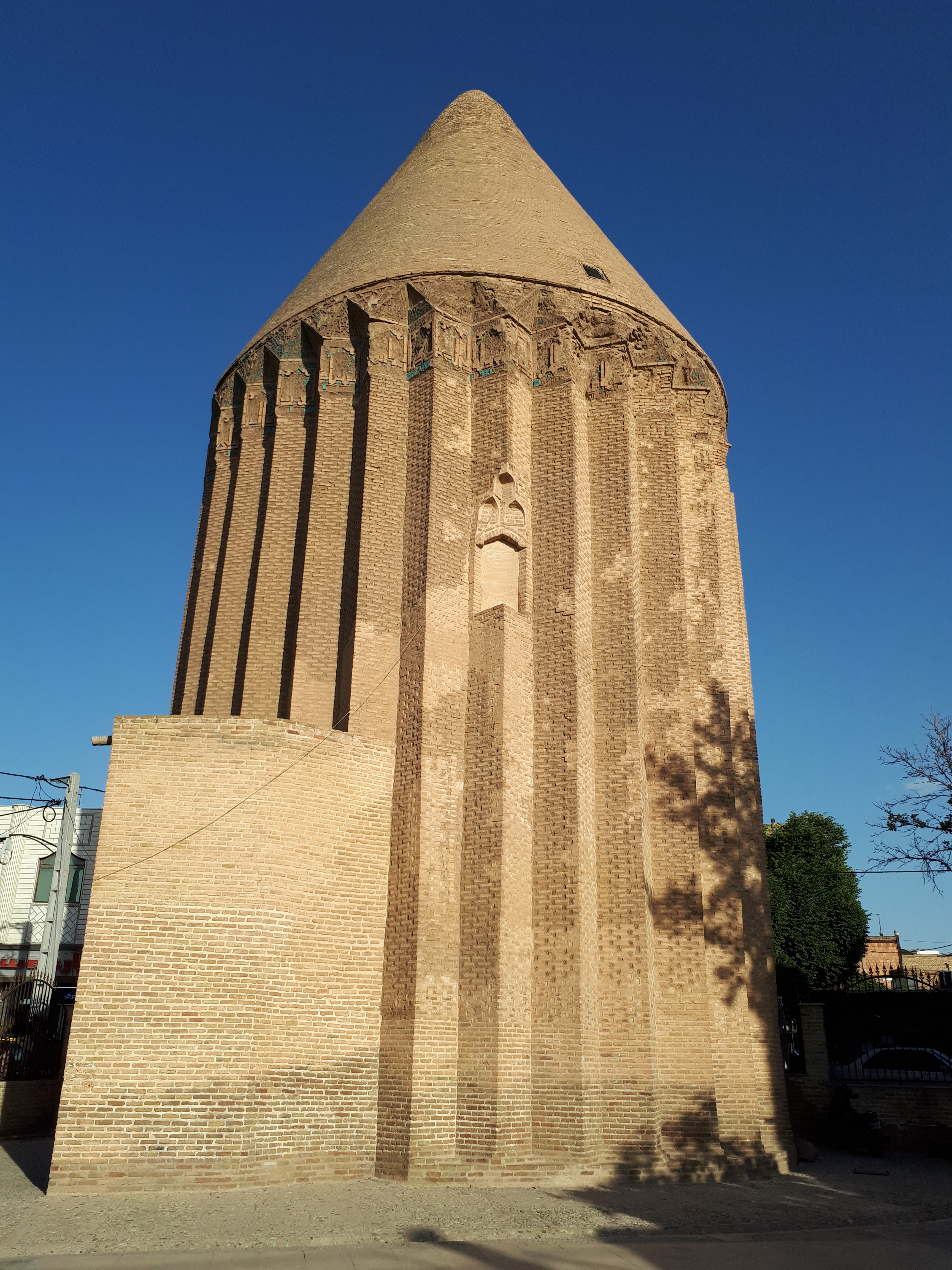 معماری دوره ایلخانیان